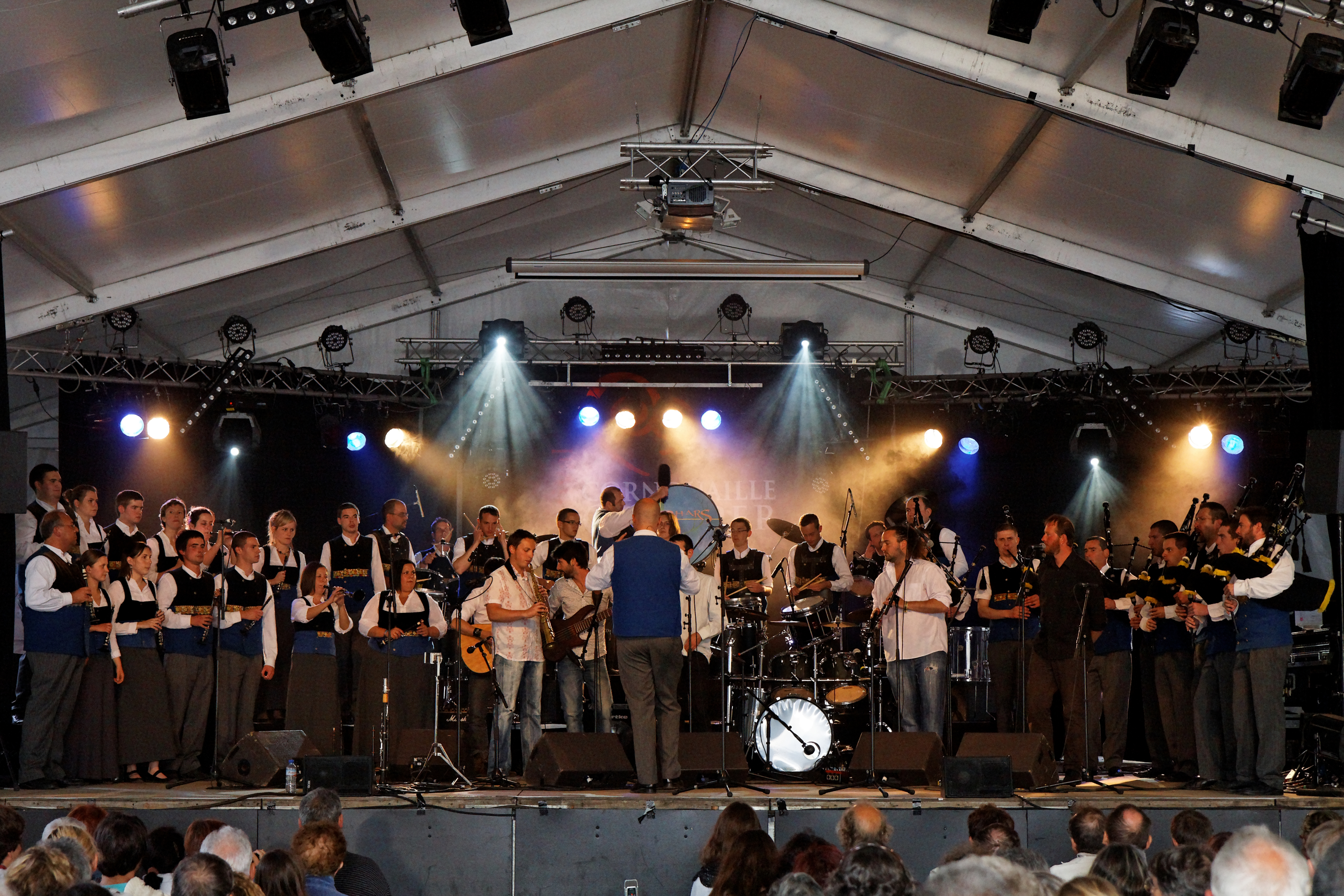 Bagad Penhars & Co en concert le 22 juillet lors du festival de Cornouaille 2011.